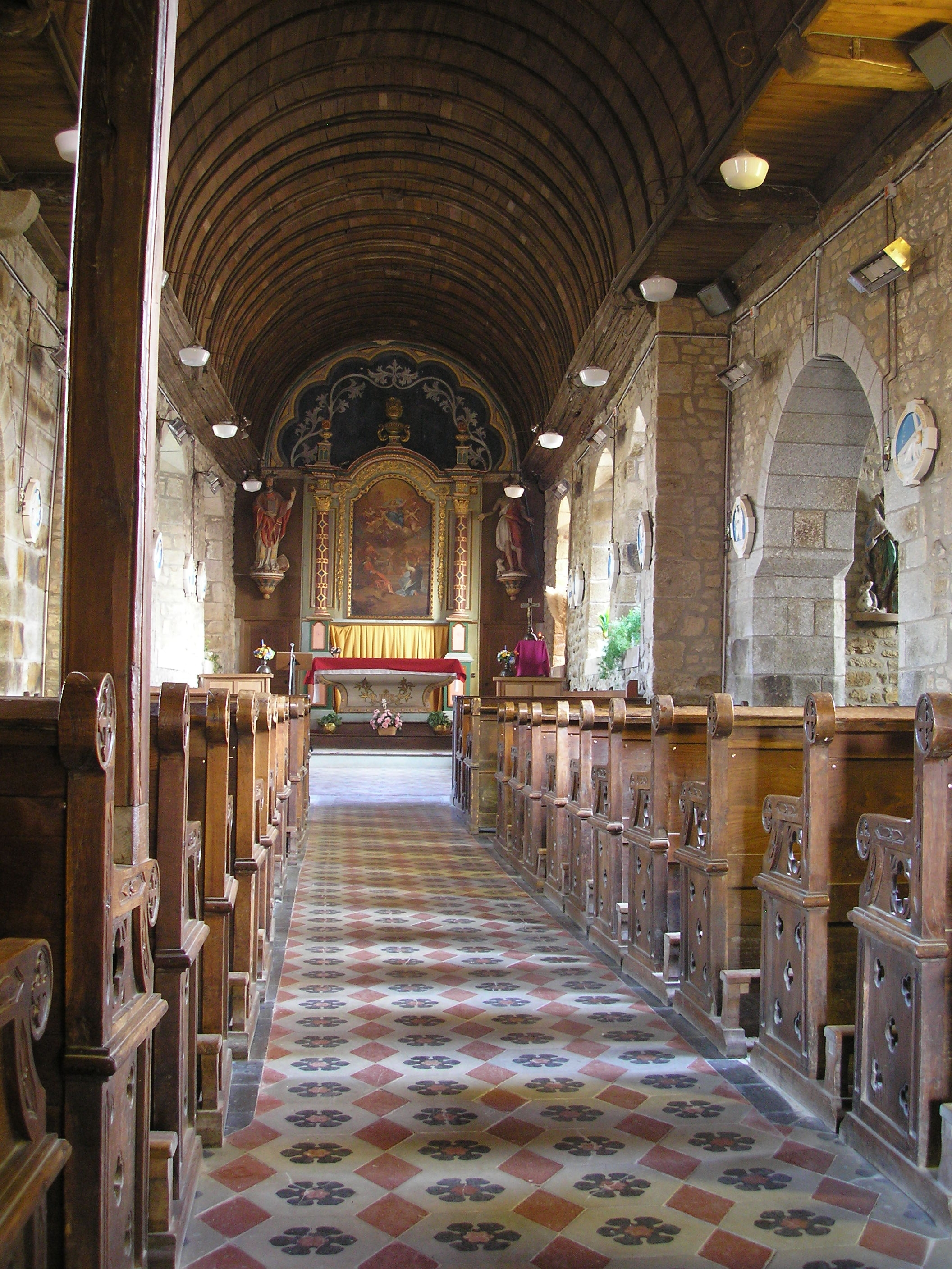 Maisoncelles-la-Jourdan (Normandie, France). Vue intérieure de l'église Saint-Amand.